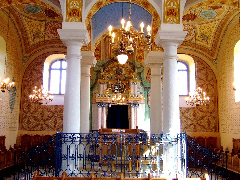 Zsinagóga, Mád This is a photo of a monument in Hungary. Identifier: 2883